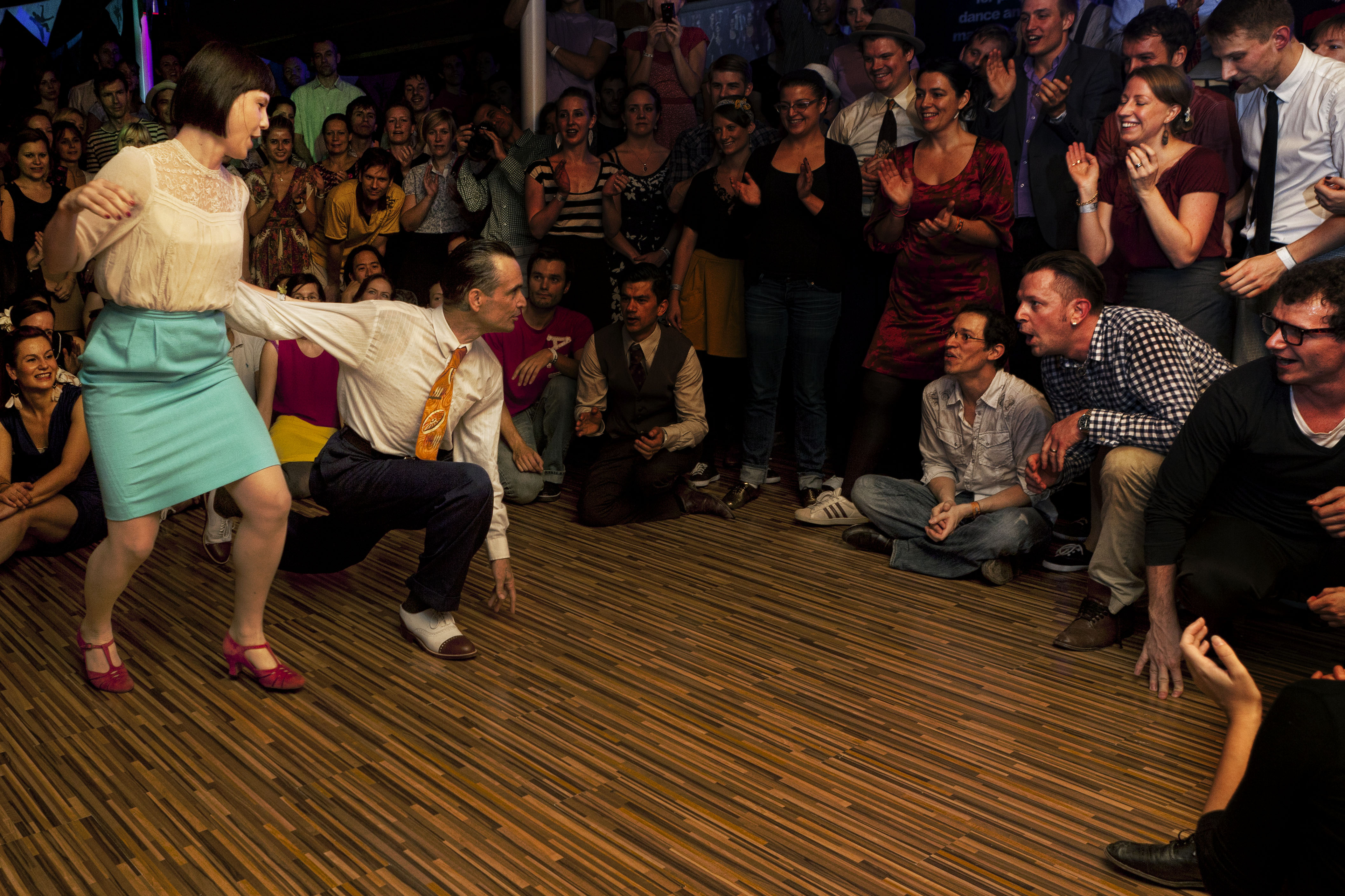 Jam au Lindyshock 2011 a Budapest, Hongrie. Danseurs: Katja Hrastar et Peter Loggins